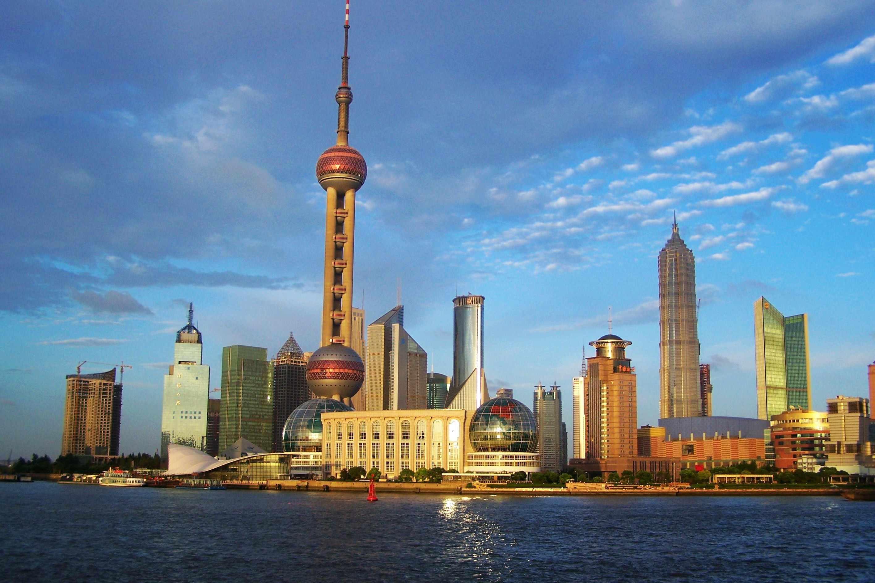 浦东 陆家嘴